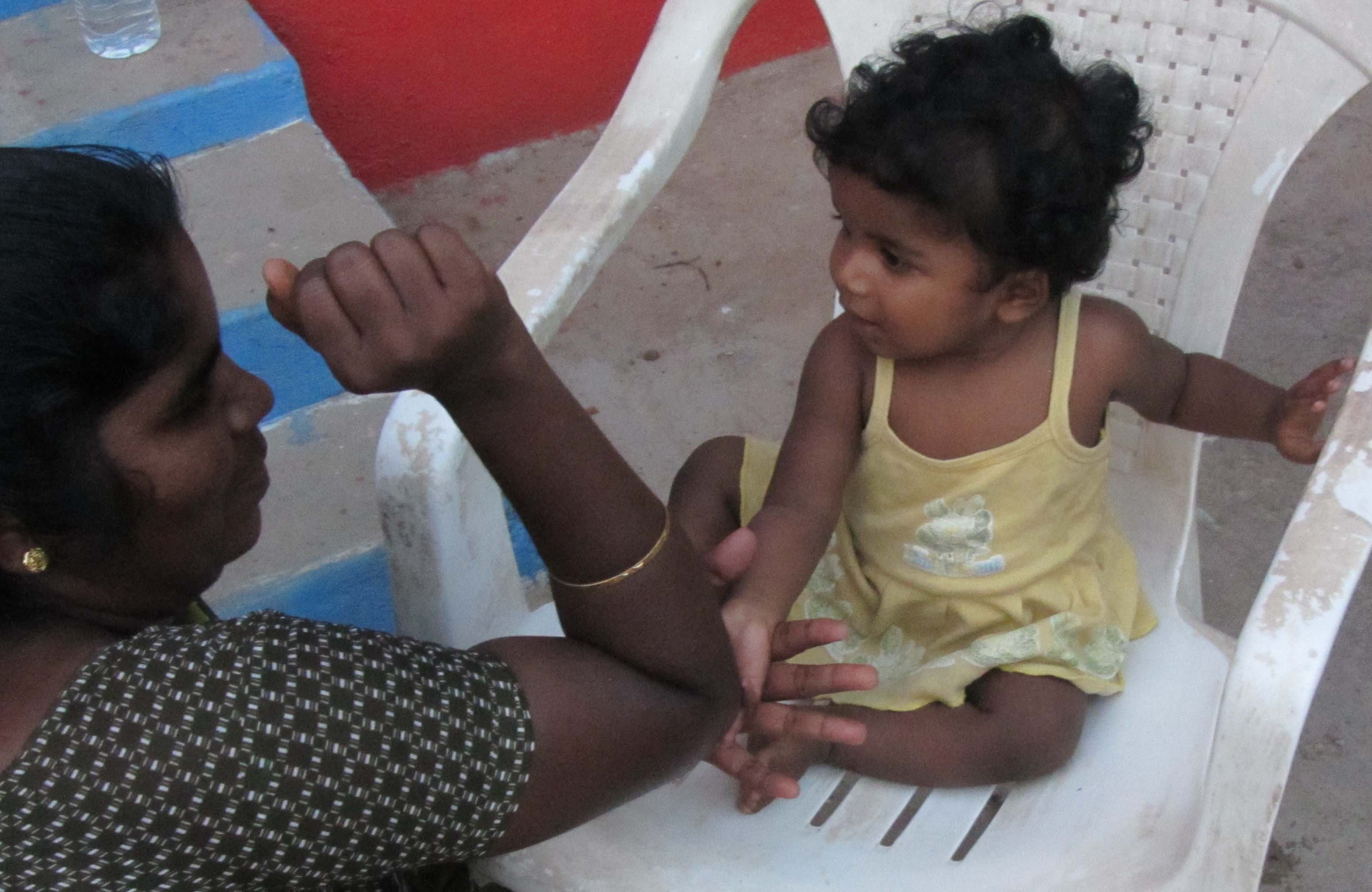 குழந்தையோடு விளையாடும் பருப்பு கடை விளையாட்டில் குழந்தை கையில் பருப்பு கடைதல் - நடிப்பு